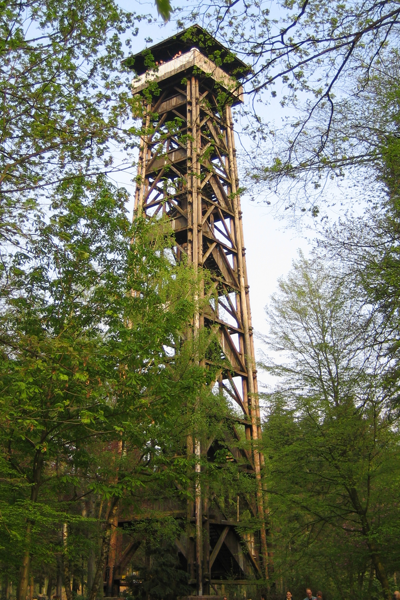 "Goetheturm", Frankfurt-Sachsenhausen, Germany.